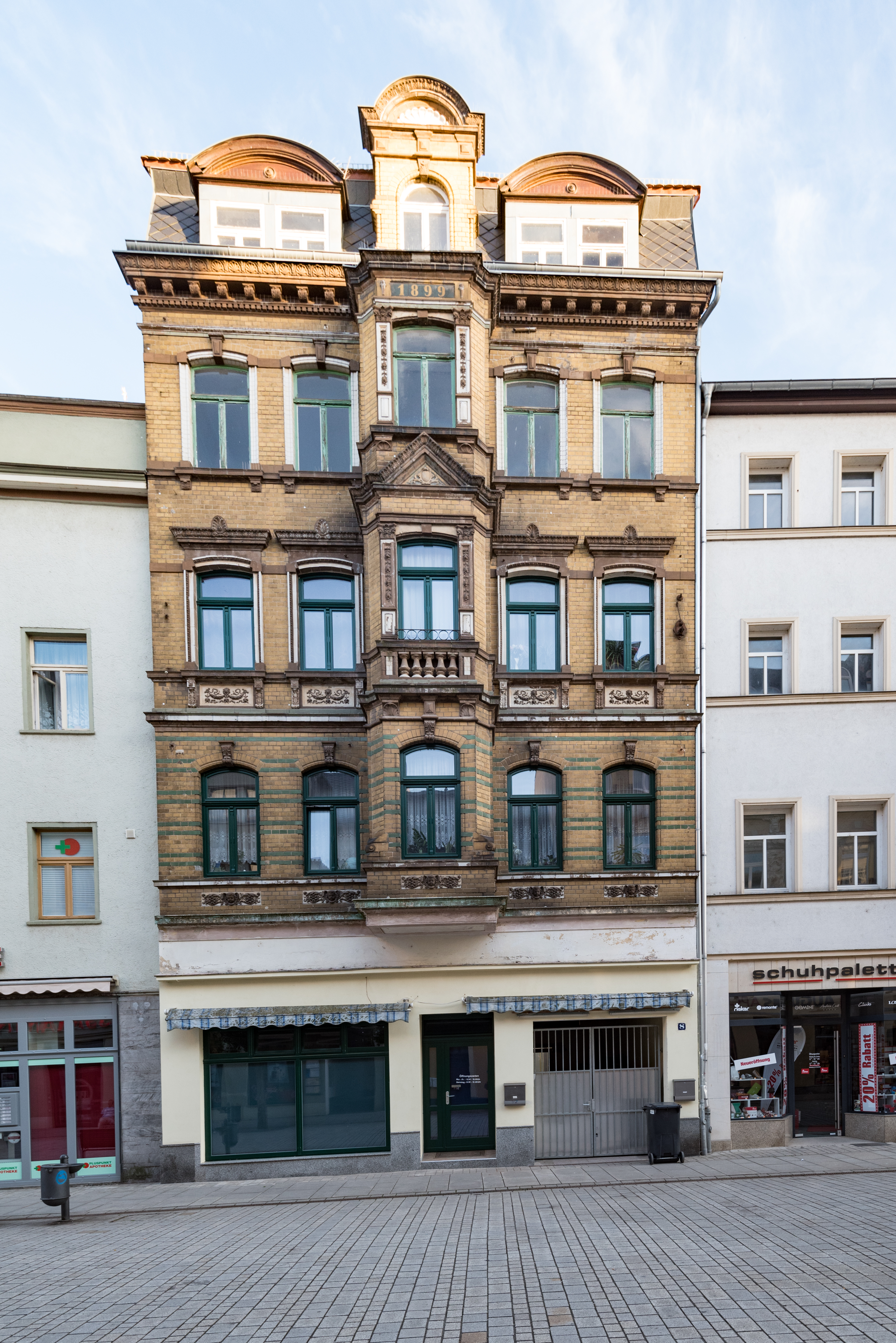 Weißenfels, Jüdenstraße 8